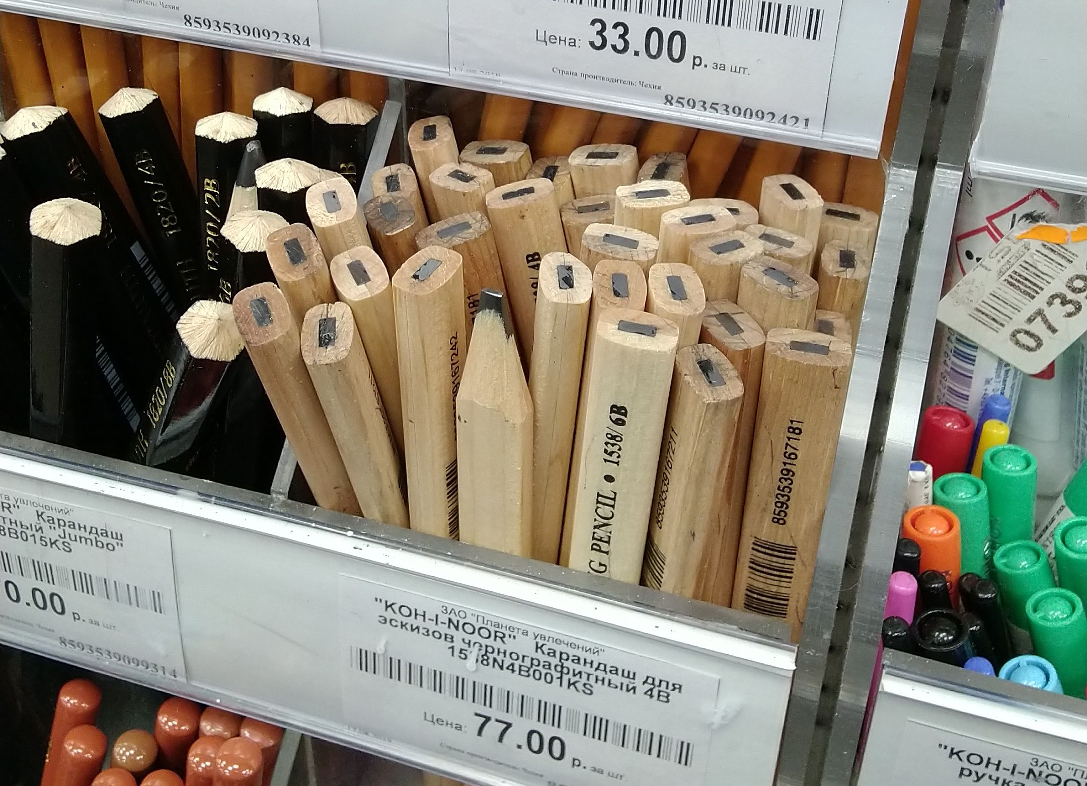 Карандаши с прямоугольным грифелем, также известные как „столярные“. Не скатываются с поверхности, оставляют широкие жирные полосы. Также популярны для письма арабской вязью.